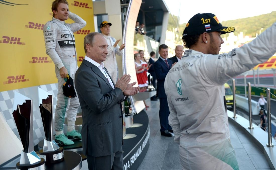 Победители Гран При Россия 2014